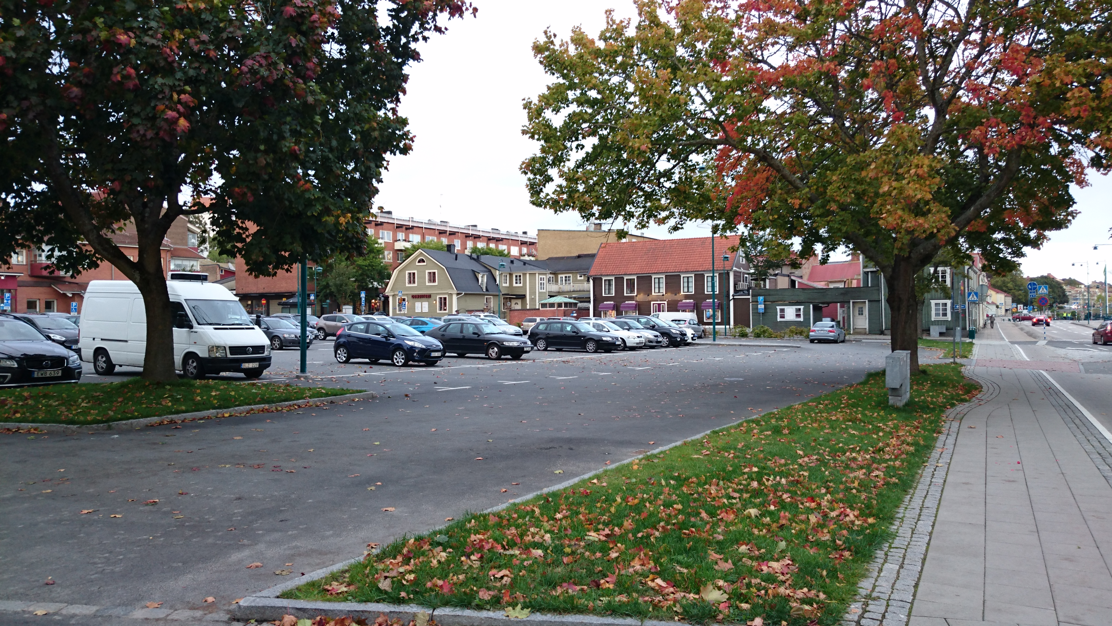 Kvarteret David i Ronneby fotograferat hösten 2017, Kvarteret Måns kan ses i bakgrunden.